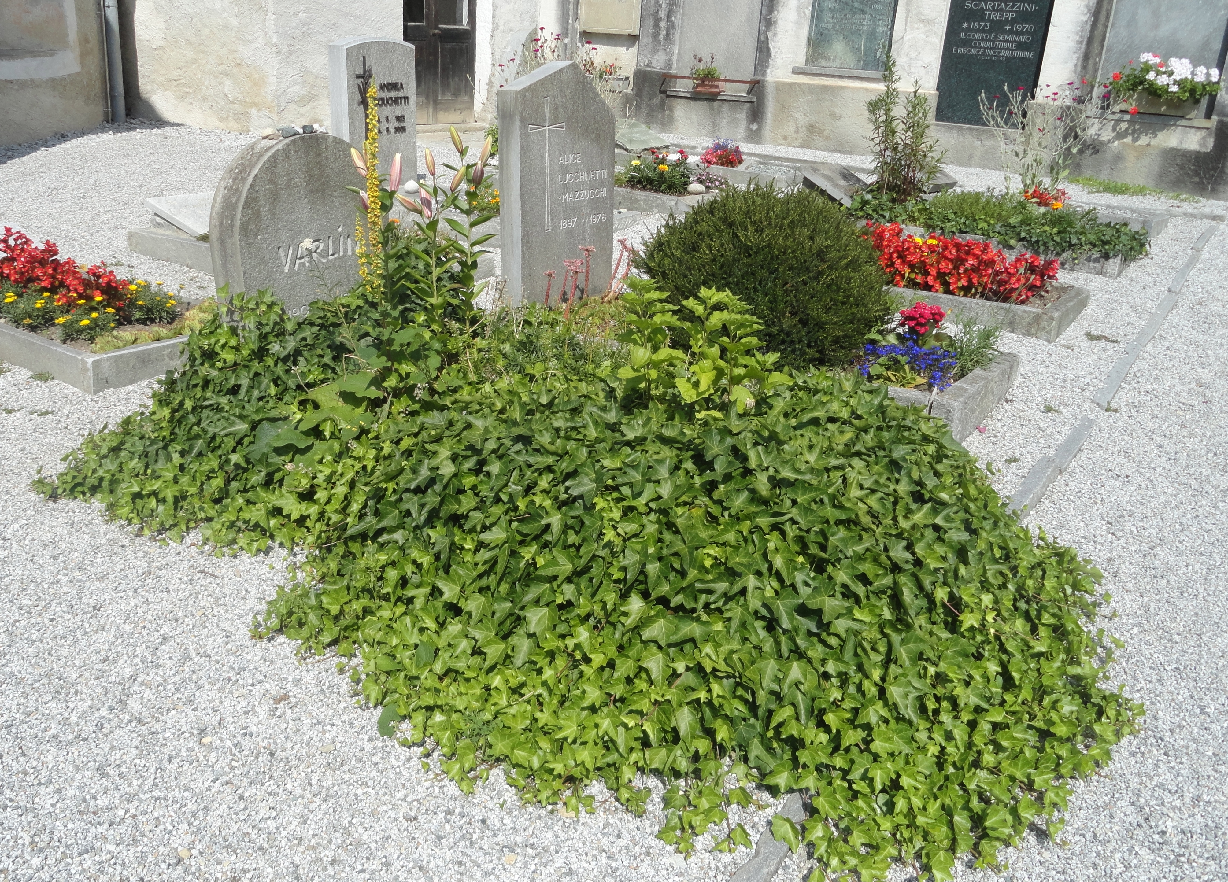 Willy Guggenheim; Grabstein auf dem Friedhof von Bondo